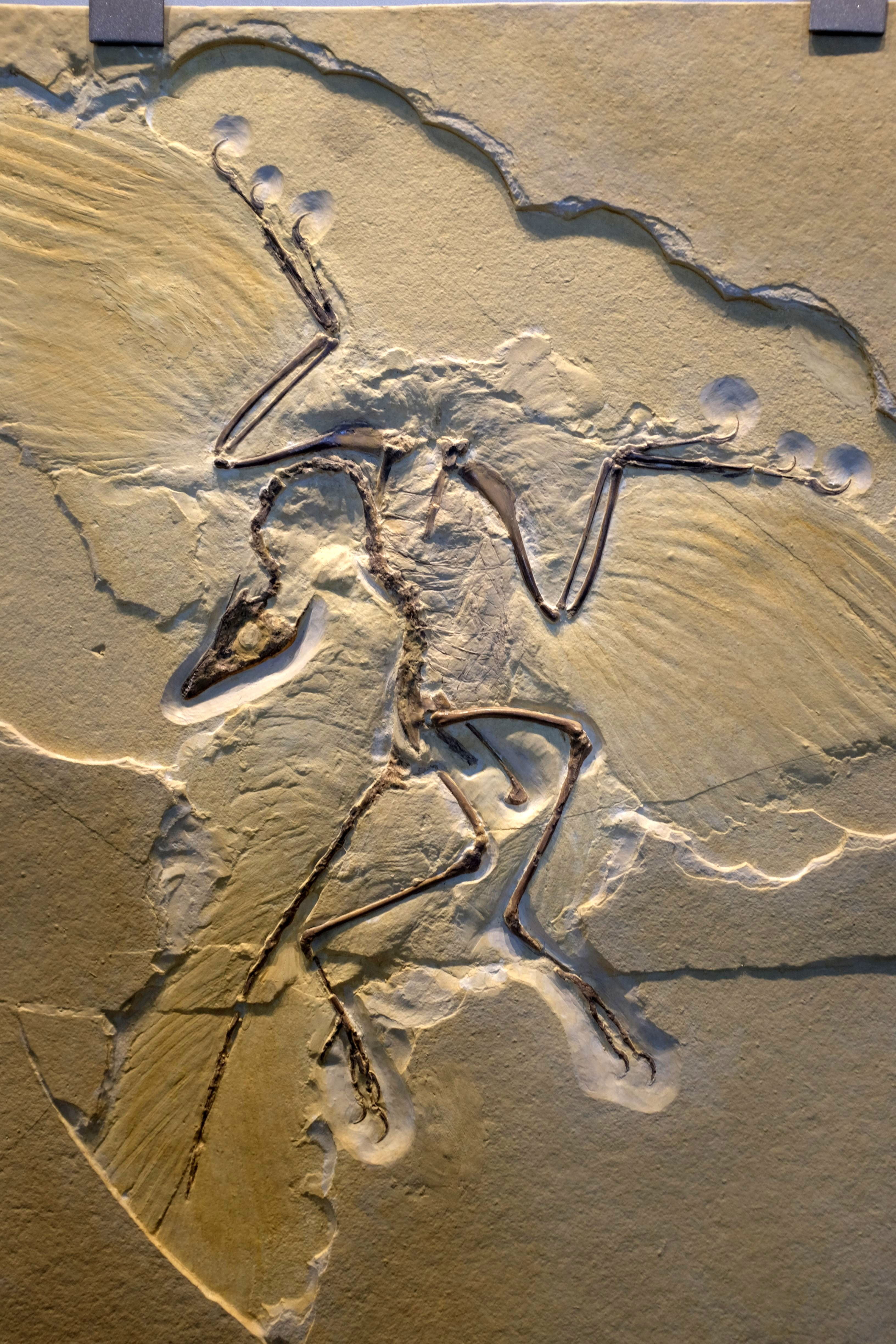 Archaeopteryx im Jura-Museum